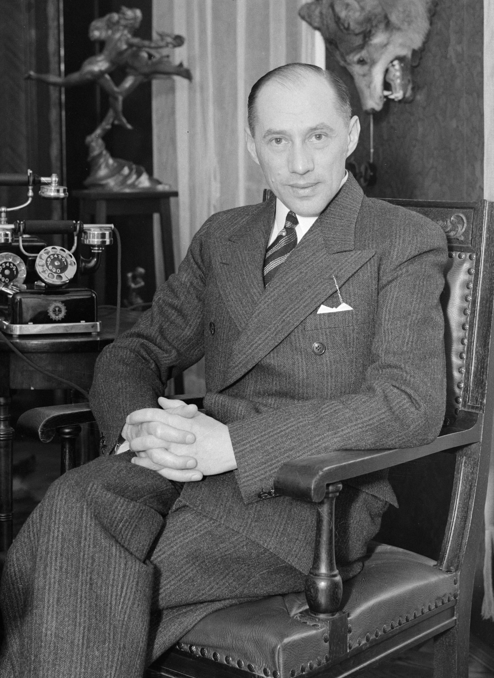 Bogusław Miedziński